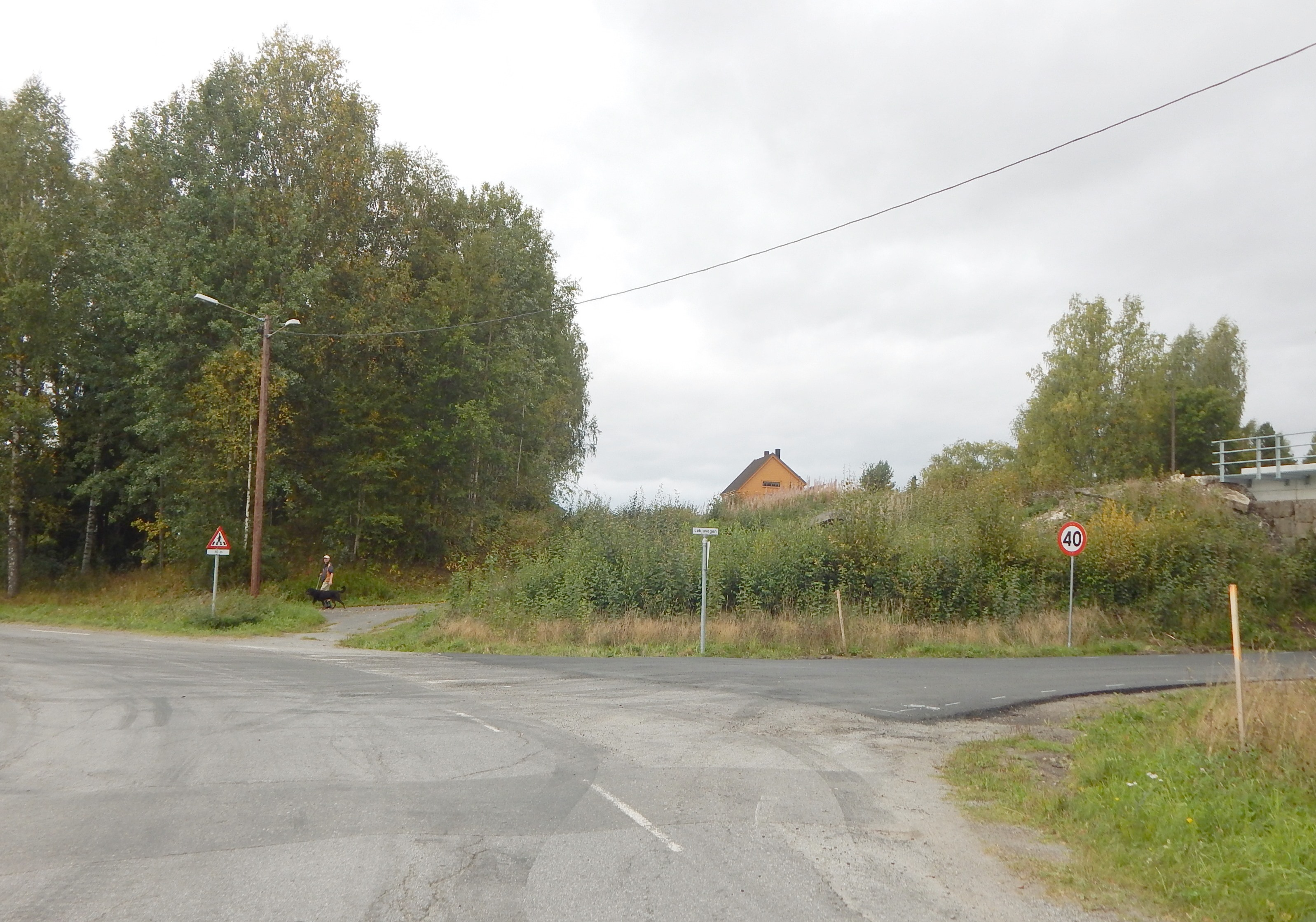 Ådalsbrukvegen forbi Ådalsbruk stasjon. Mot venstre i bildet er den fylkesvei 1920 (tidl. 241). Mot høyre (gjennom undergangen) og bakover er den fylkesvei 1838 (tidl. 162).